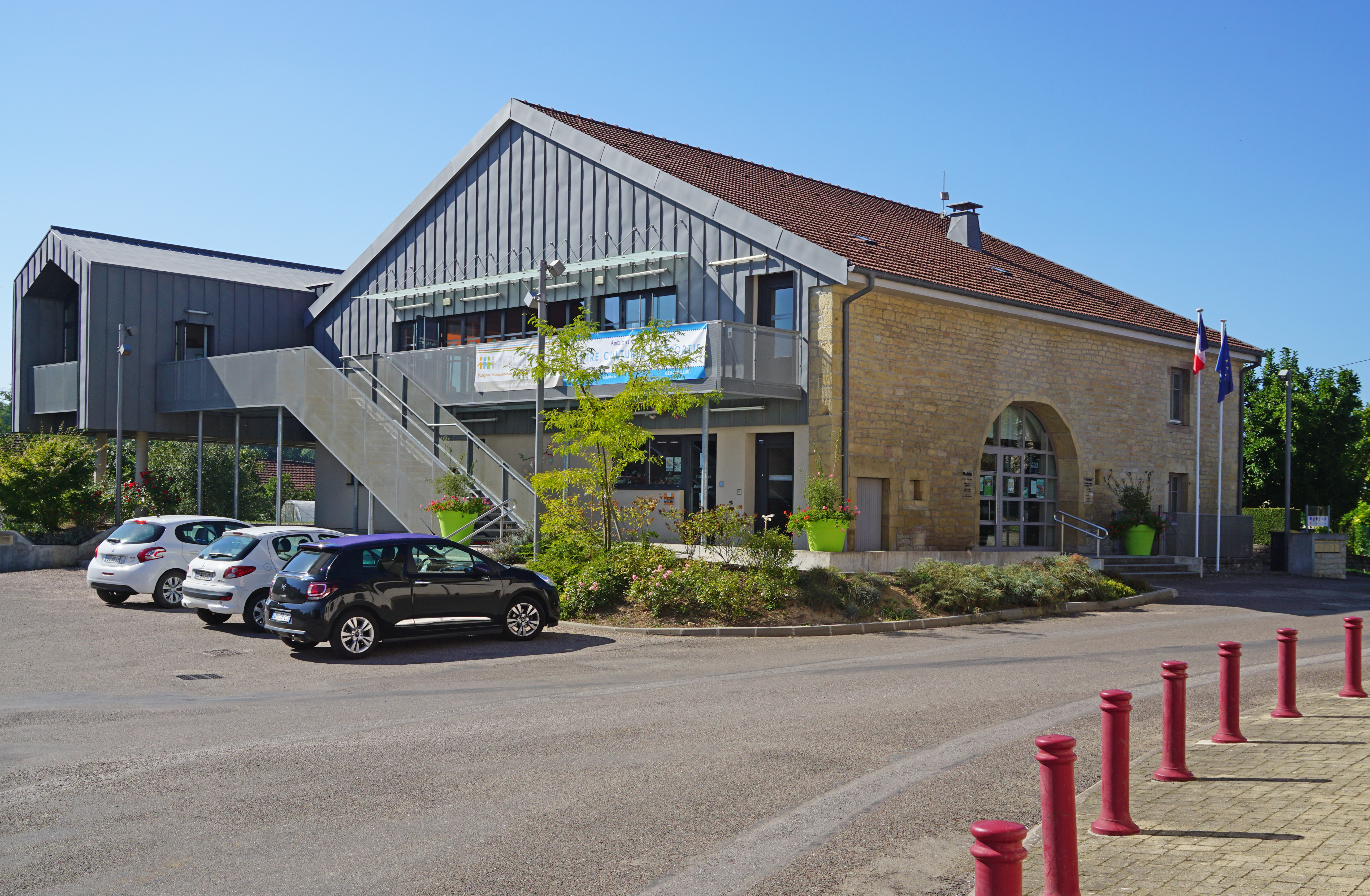 Mairie, maison de services, centre culturel et sportif d'Amblans-et-Velotte.